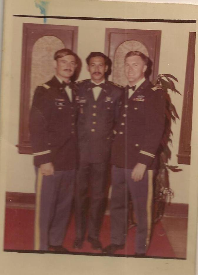 El Comandante Bravo es el del medio aqui con dos militares Americanos.